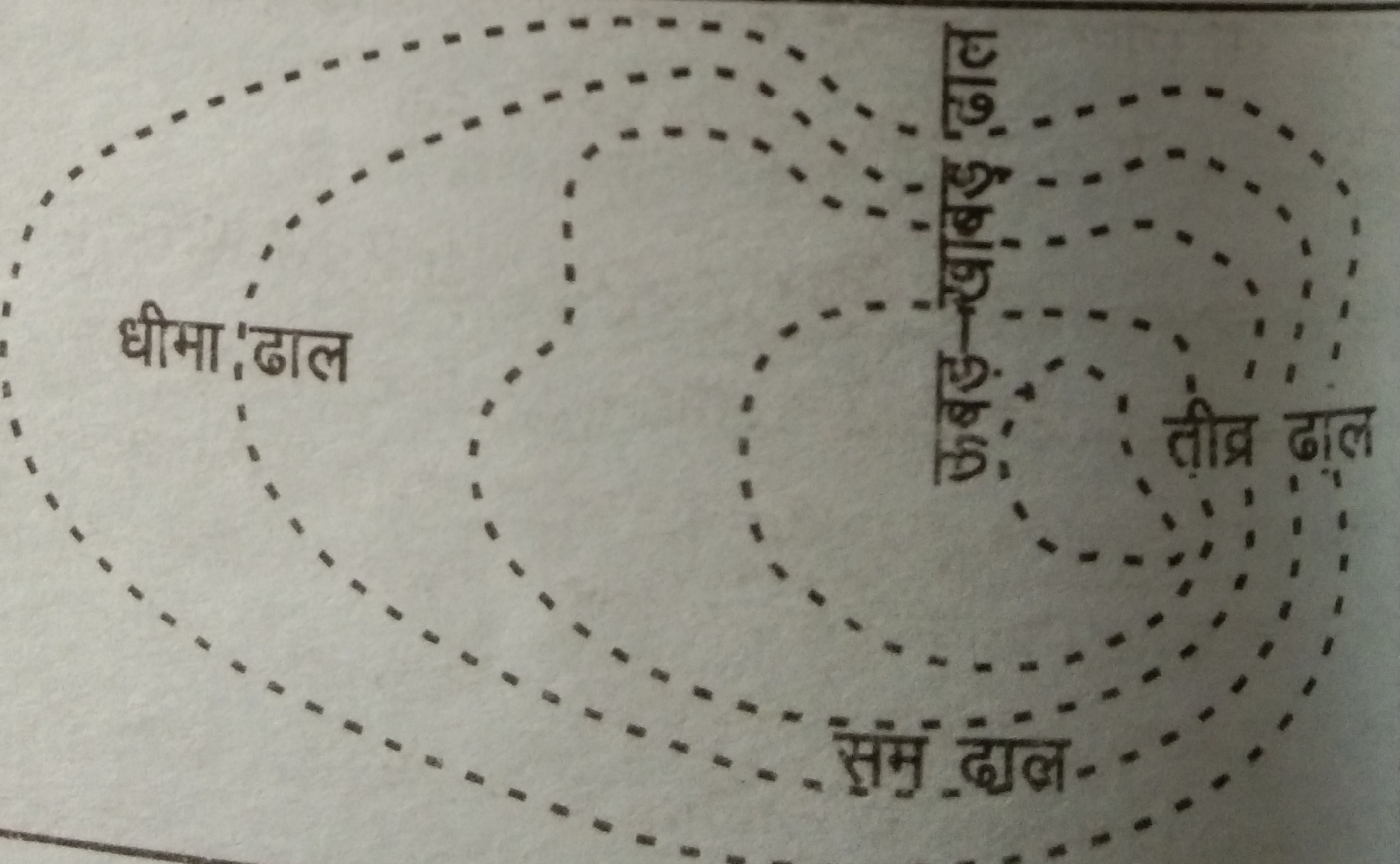 स्वरूप रेखा विधि